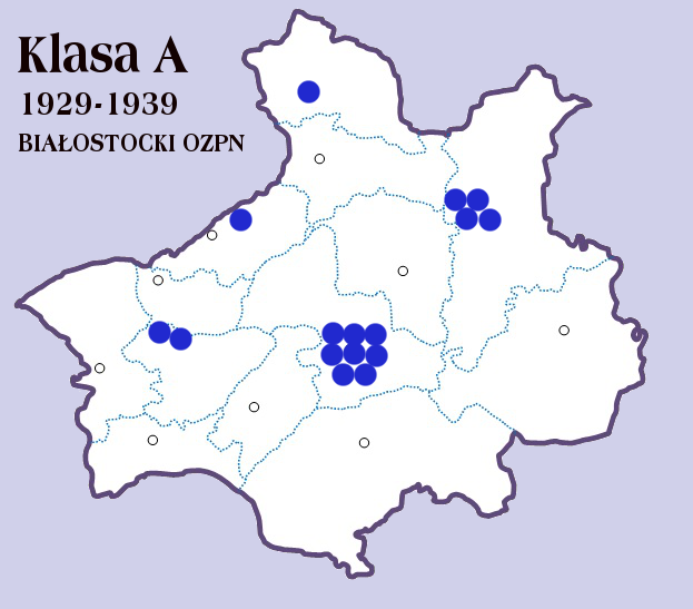 Klasa A Białystok (BOZPN, w latach 1929-39).